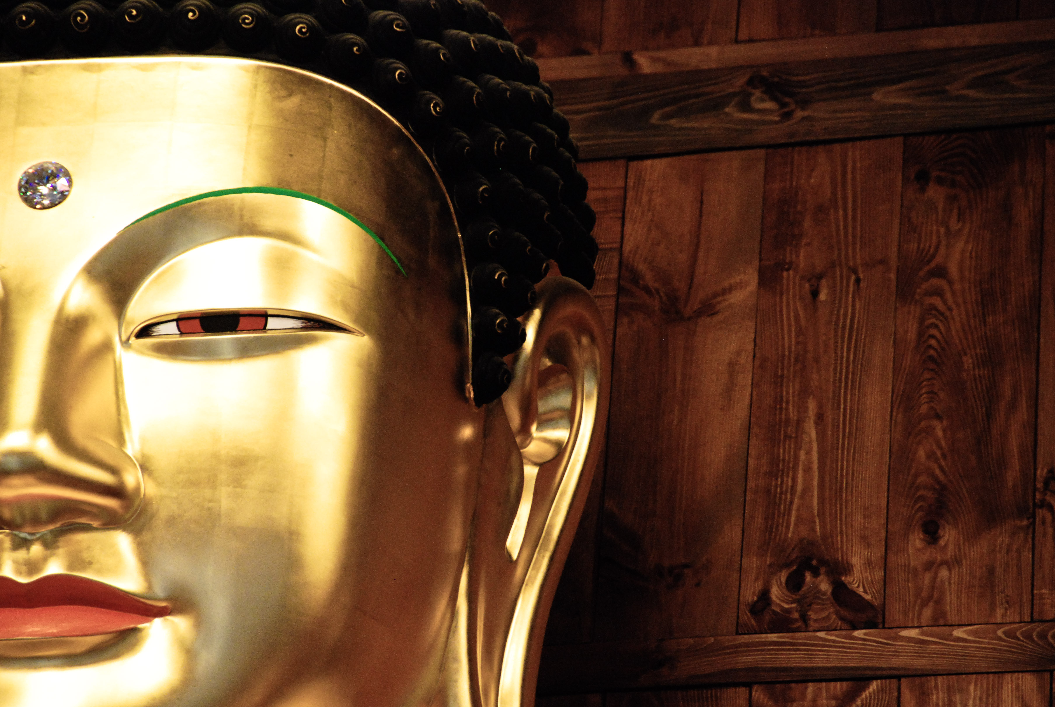 Buddha's Birthday